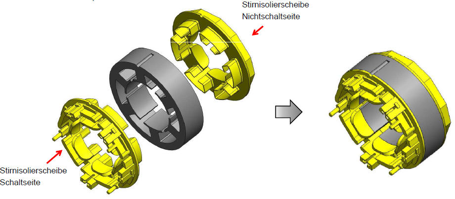 Konzept eines endscheibenisolierten Vollblechschnittstators